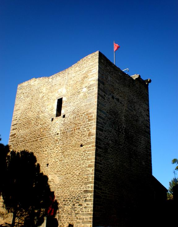 Tour à Trausse (Aude)